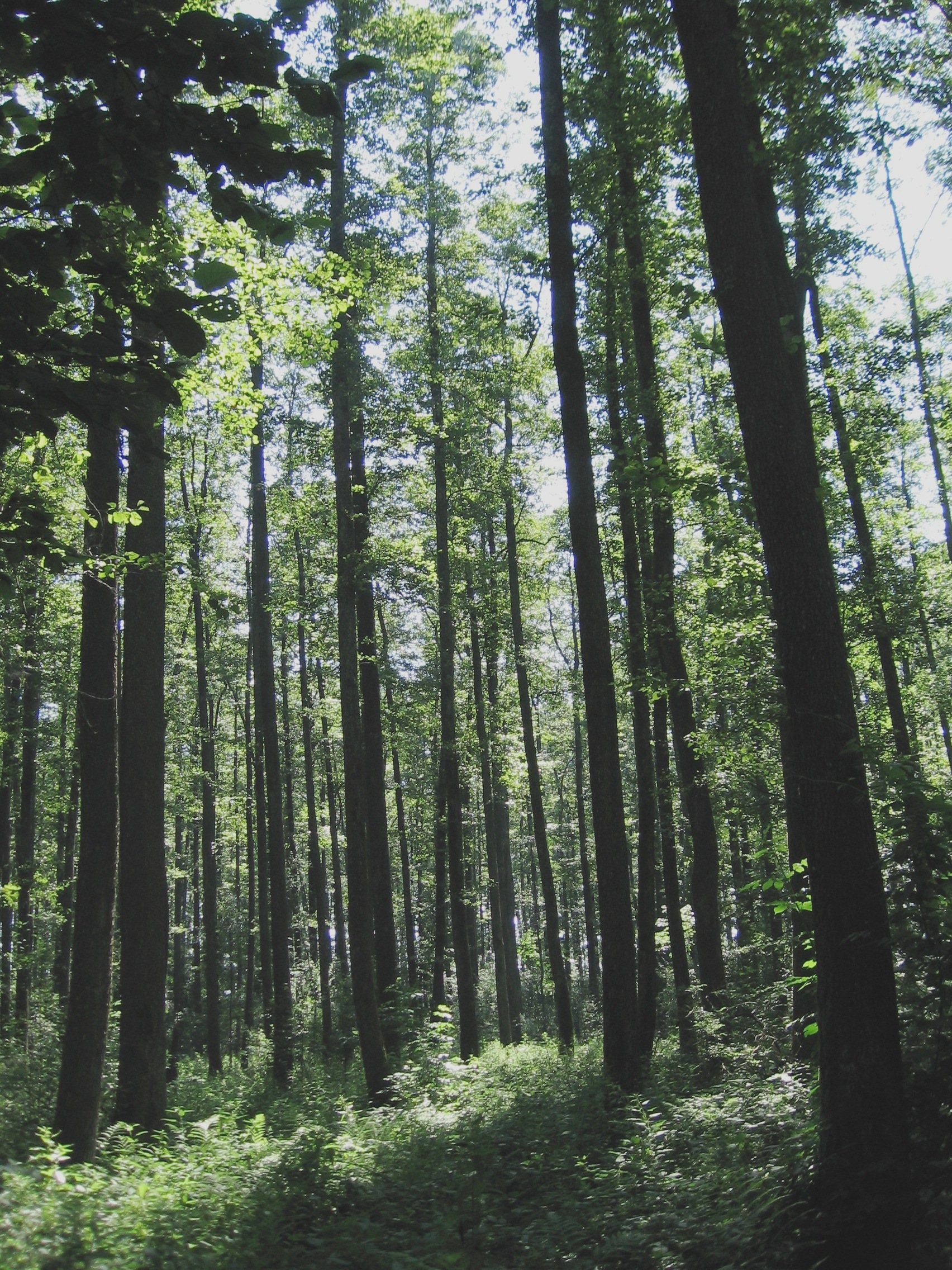 Regularna šuma crne johe u Podravini (Posebni rezervat šumske vegetacije "Crni jarki")